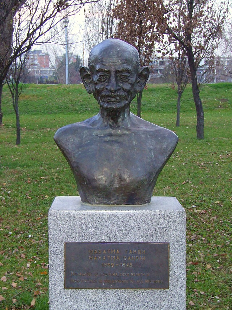 Биста Махатме Гандија на Савском Кеју у Новом Београду, у близини Гандијеве улице. Натпис на споменику "Ненасиље је суштина свих религија - Non-violence is the essence of all religions"